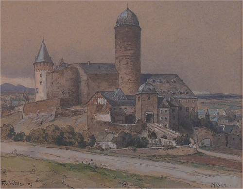 Die Genovevaburg in Mayen; Aquarell, 40 x 50 cm. Signiert und datiert F. v. Wille 07, betitelt Mayen.